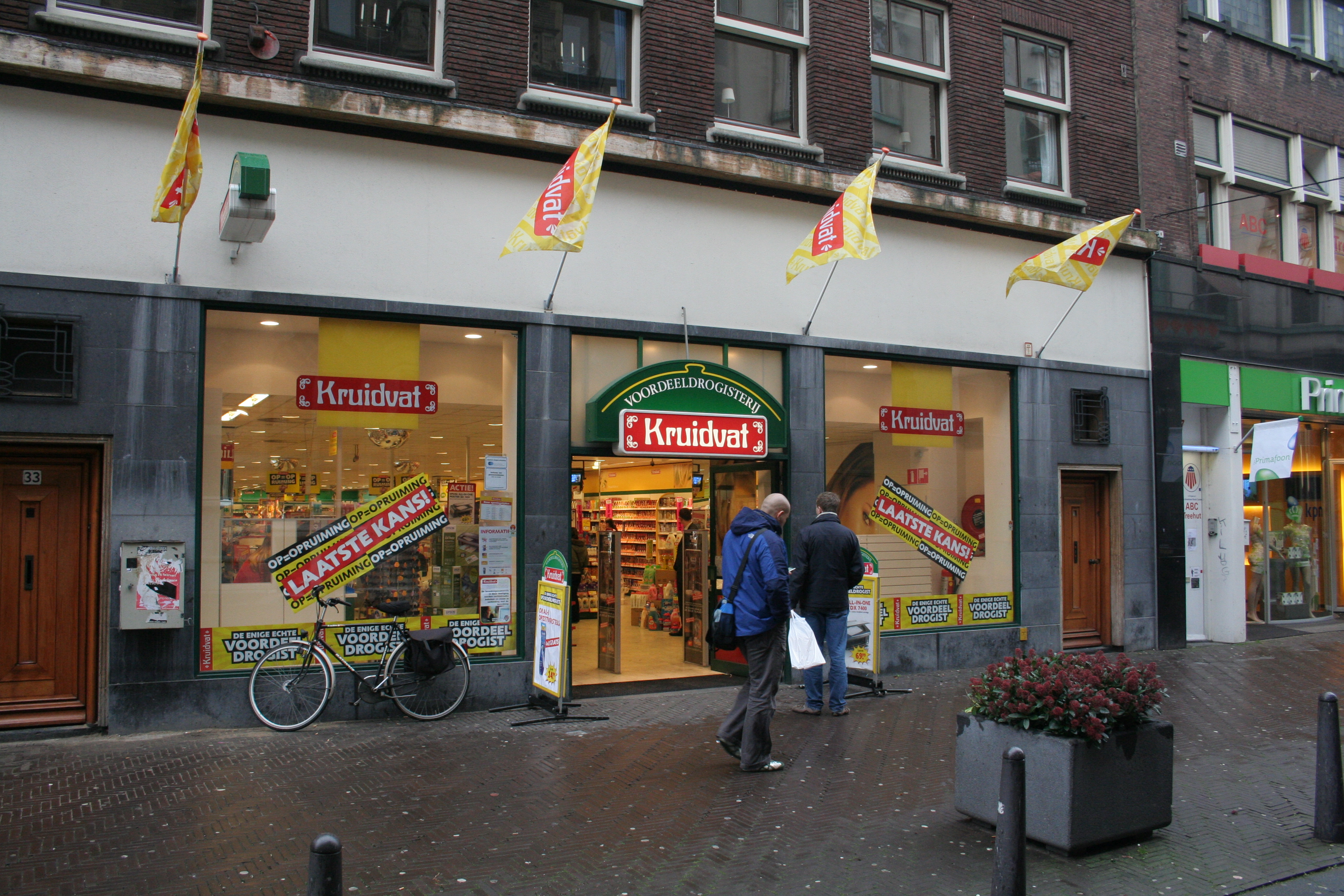 Kruidvat-winkel in Den Haag